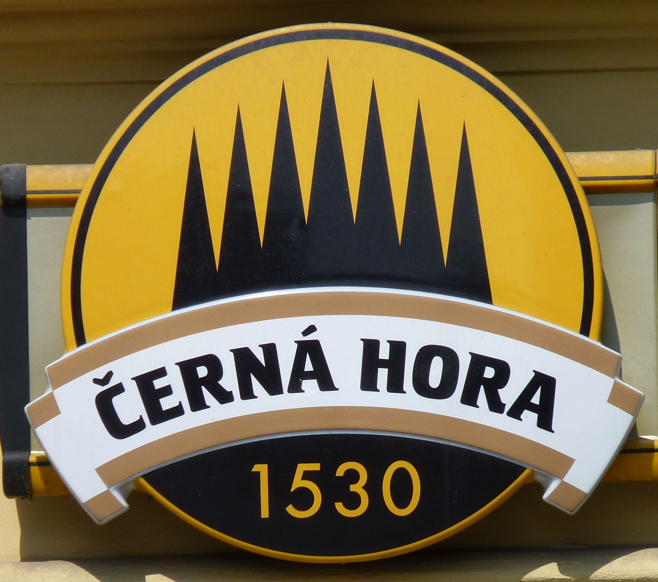 Cedule pivovaru Černá hora (restaurace U Kyršů, Brno)